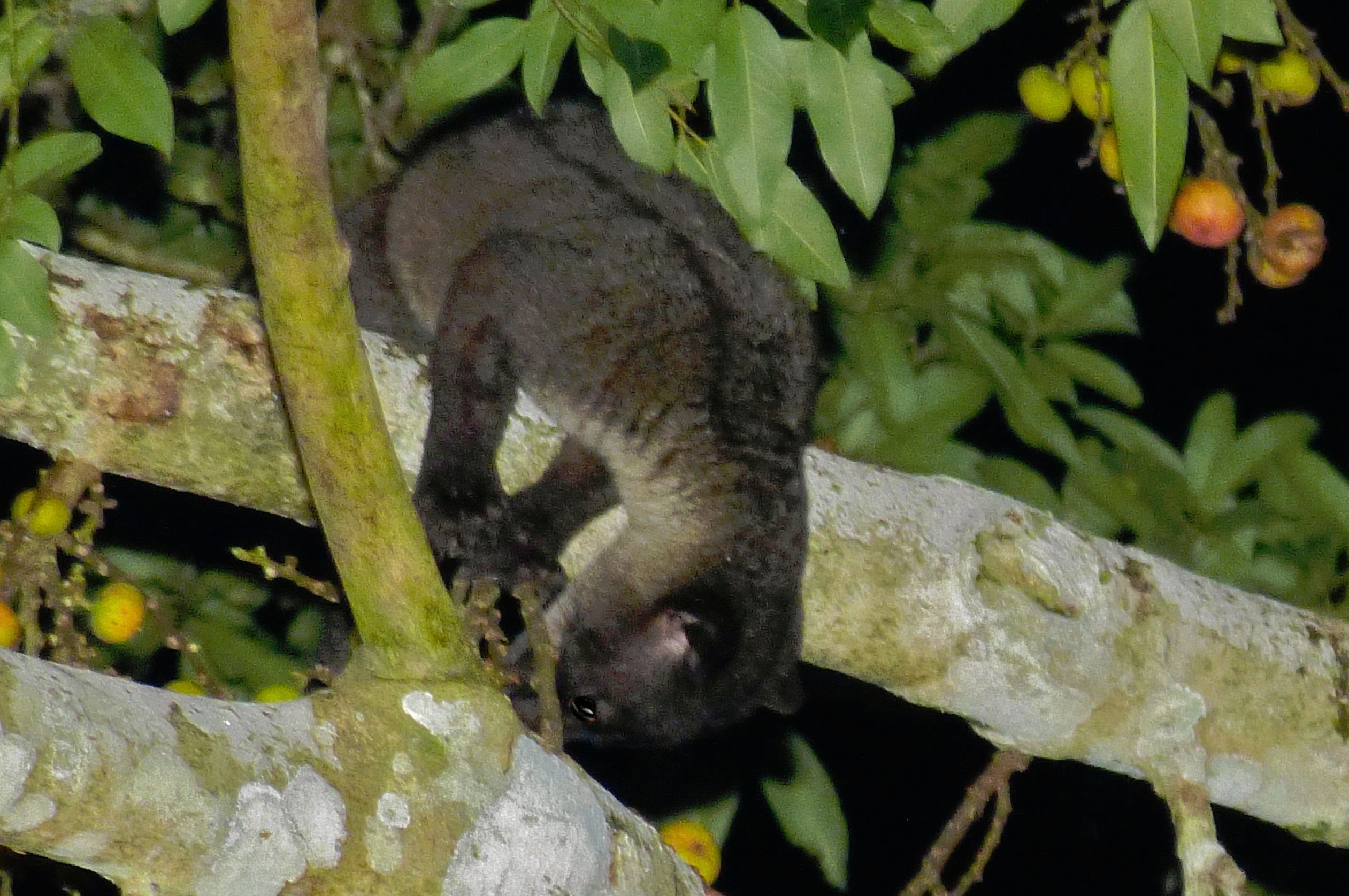 Kinabatangan River, Sabah, MALAYSIA